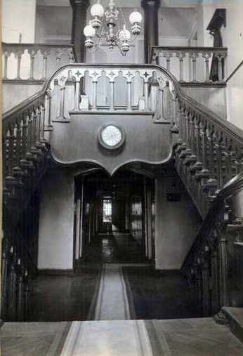 Вестибюль усадьбы Устиновых, кон. XIX века